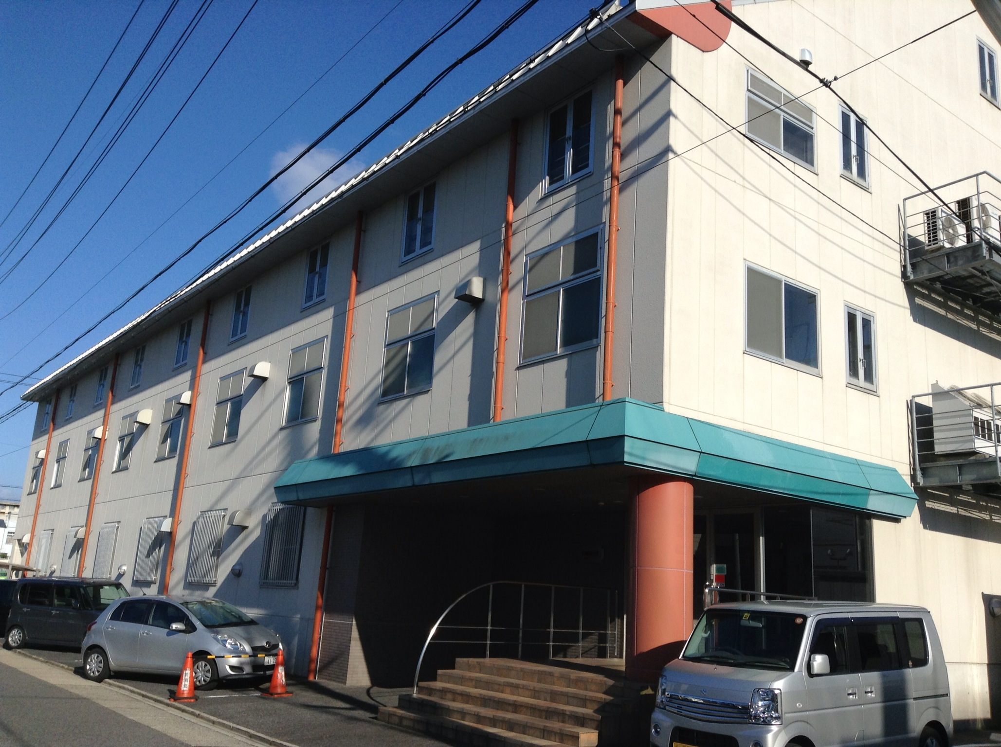 名古屋市北区大野町にある若鯱家本部を北西側から写す